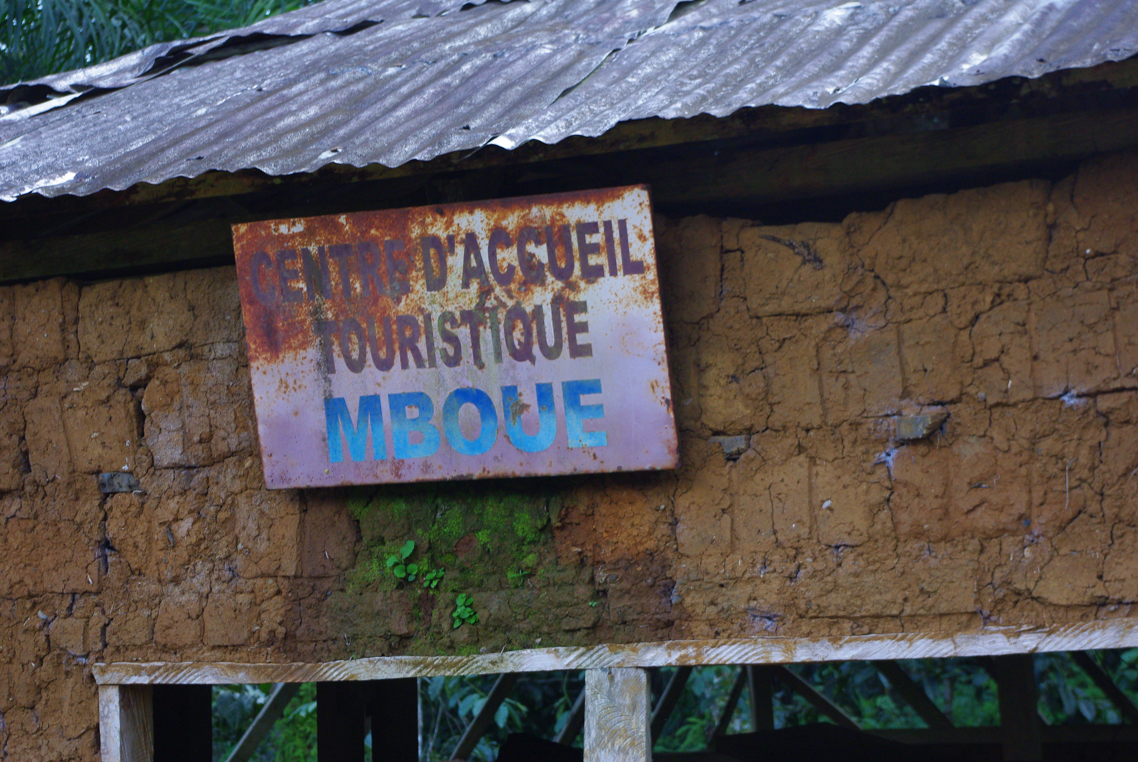 Accueil au "village de la jungle" dans le village Mboué